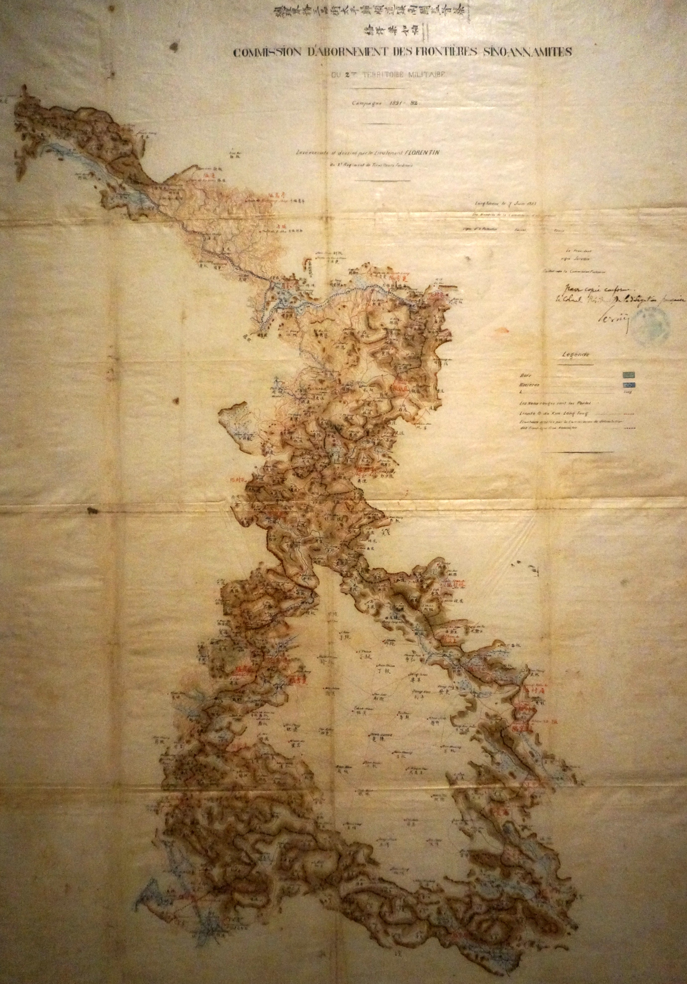 Présenté lors de l'exposition Indochine des territoires et des hommes 1856 1956 . Carte_de_l'abornement_de la frontière sino annamite par_le lieutenant Fromentin du 2e régiment tonkinois, 1891-92.